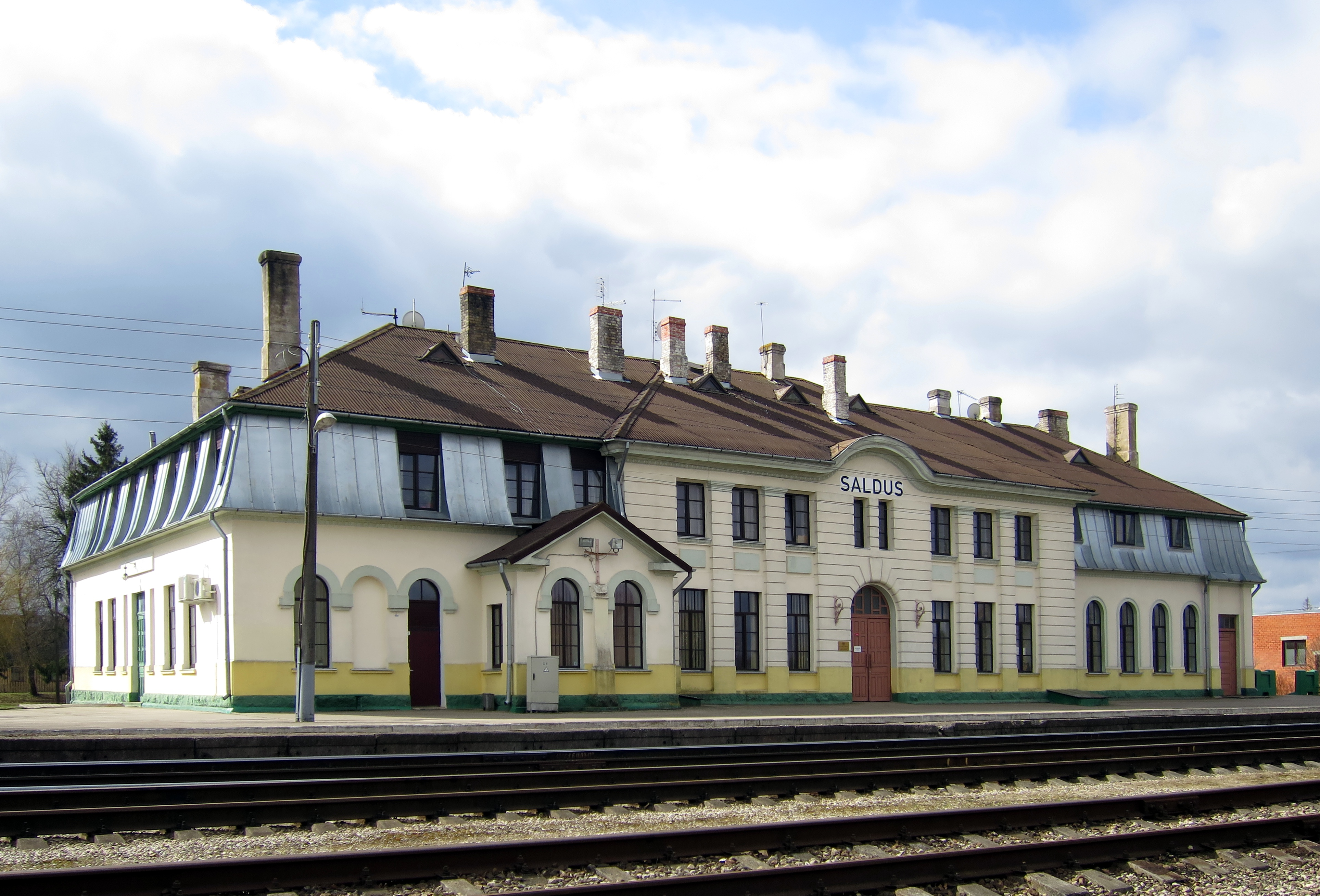 Saldus stacijas ēka. Arhitekts Pēteris Feders (1868—1936).